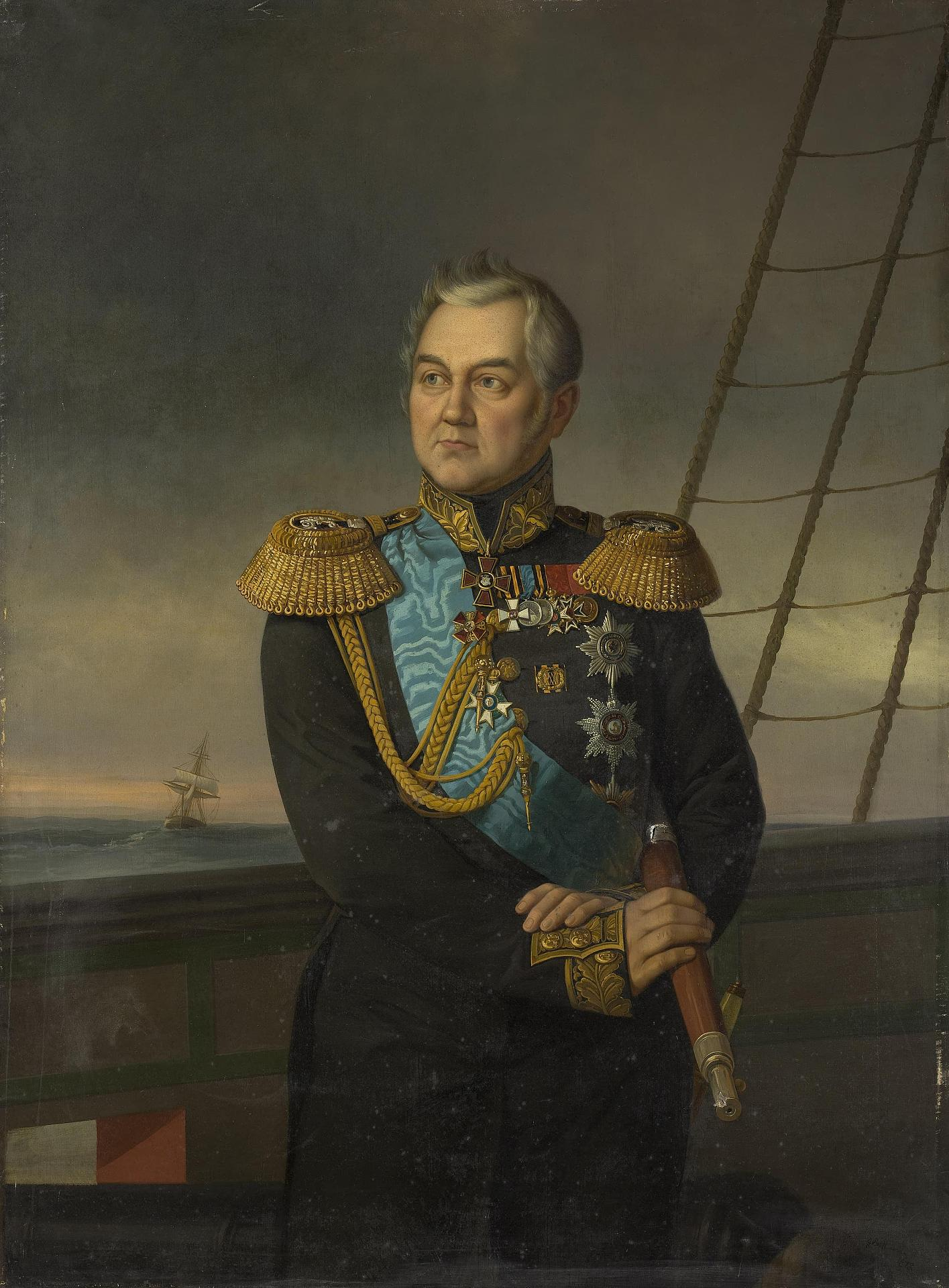 Портрет адмирала Михаила Петровича Лазарева